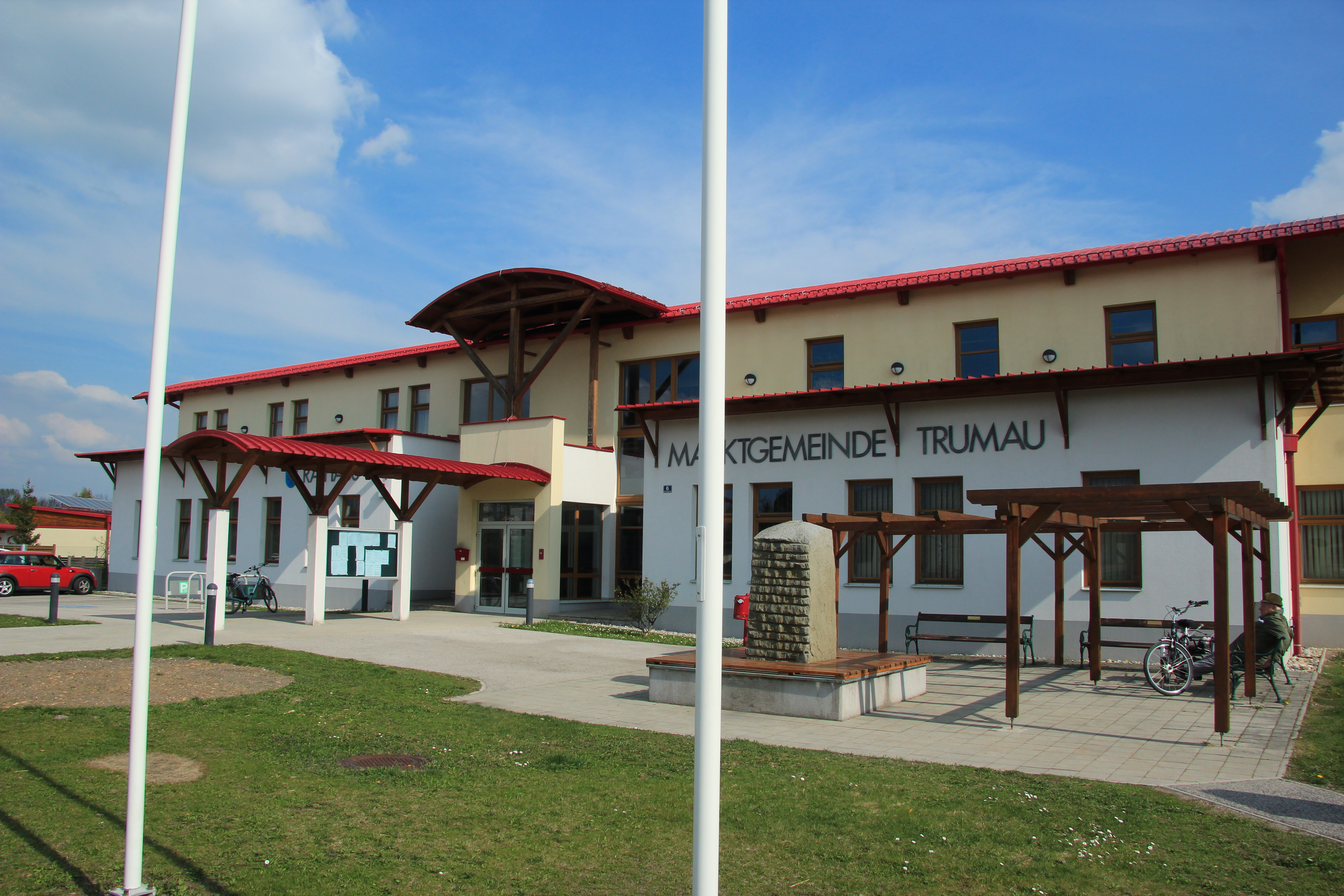 Gemeindeamt in Trumau, Niederösterreich